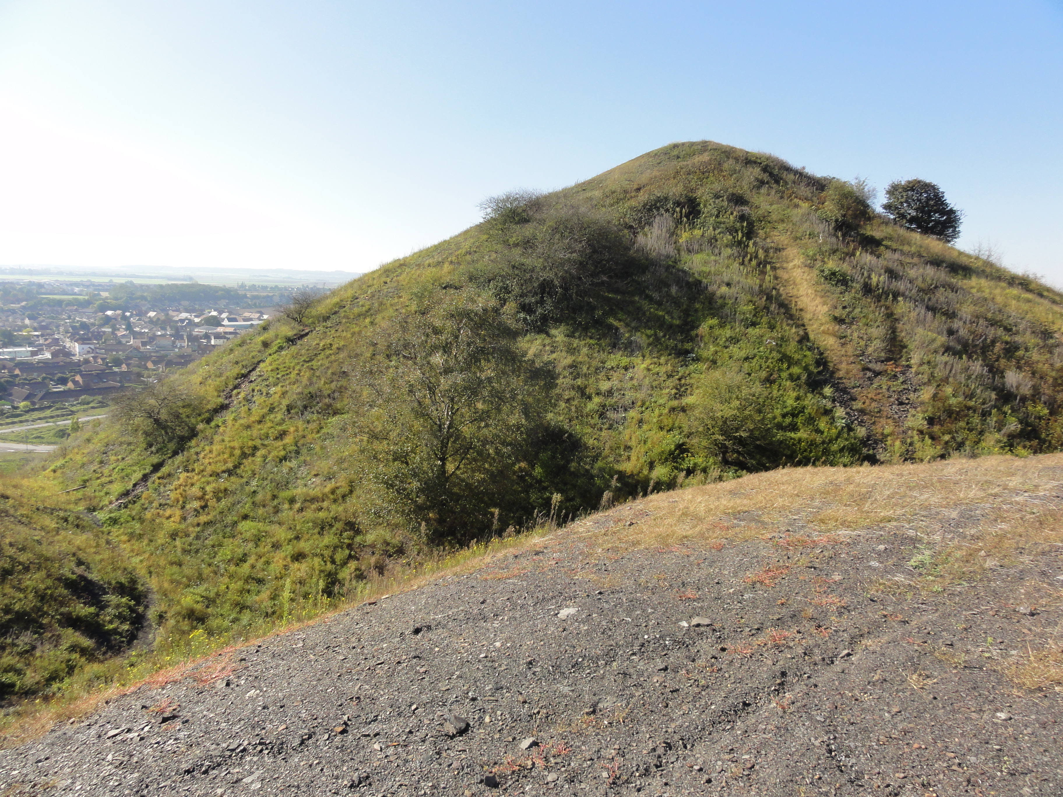 Terril n° 84 dit 2 Sud de Drocourt, fosse n° 2 de la Compagnie des mines de Drocourt dans le bassin minier du Nord-Pas-de-Calais, Rouvroy, Pas-de-Calais, Nord-Pas-de-Calais, France. Le terril no 84 est inscrit sur la liste du patrimoine mondial de l'Unesco le 30 juin 2012 et y constitue en partie le site no 48.